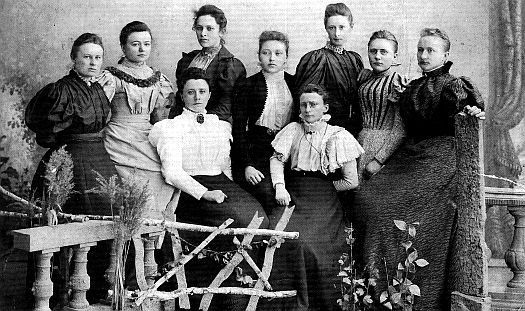 Wandelclubje Pluvia, Voorloper Magna Pete